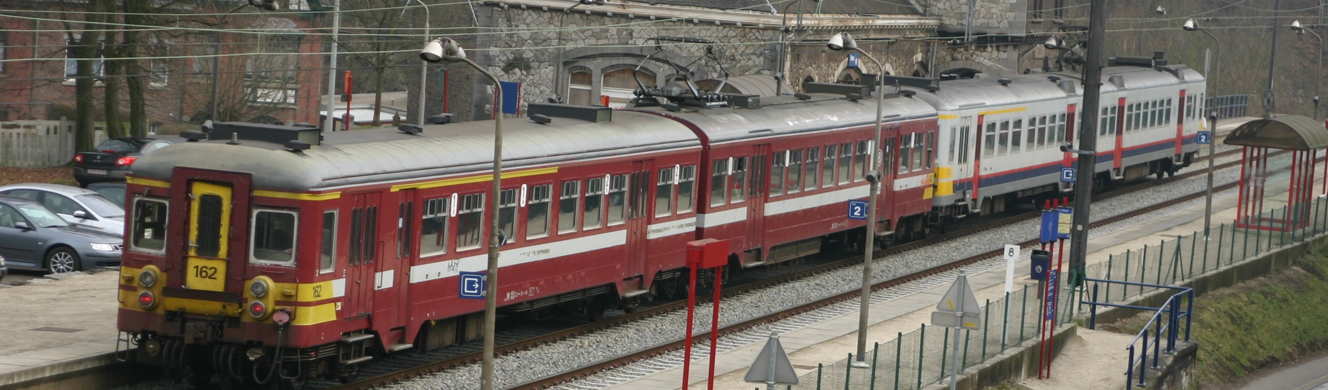 De Regionalzuch R5263 an der Gare vun Trooz a Richtung Verviers. Vir am Bild eng Automotrice AM62 um Krop vun enger AM66 mat dem hellen Ustrach. AM62